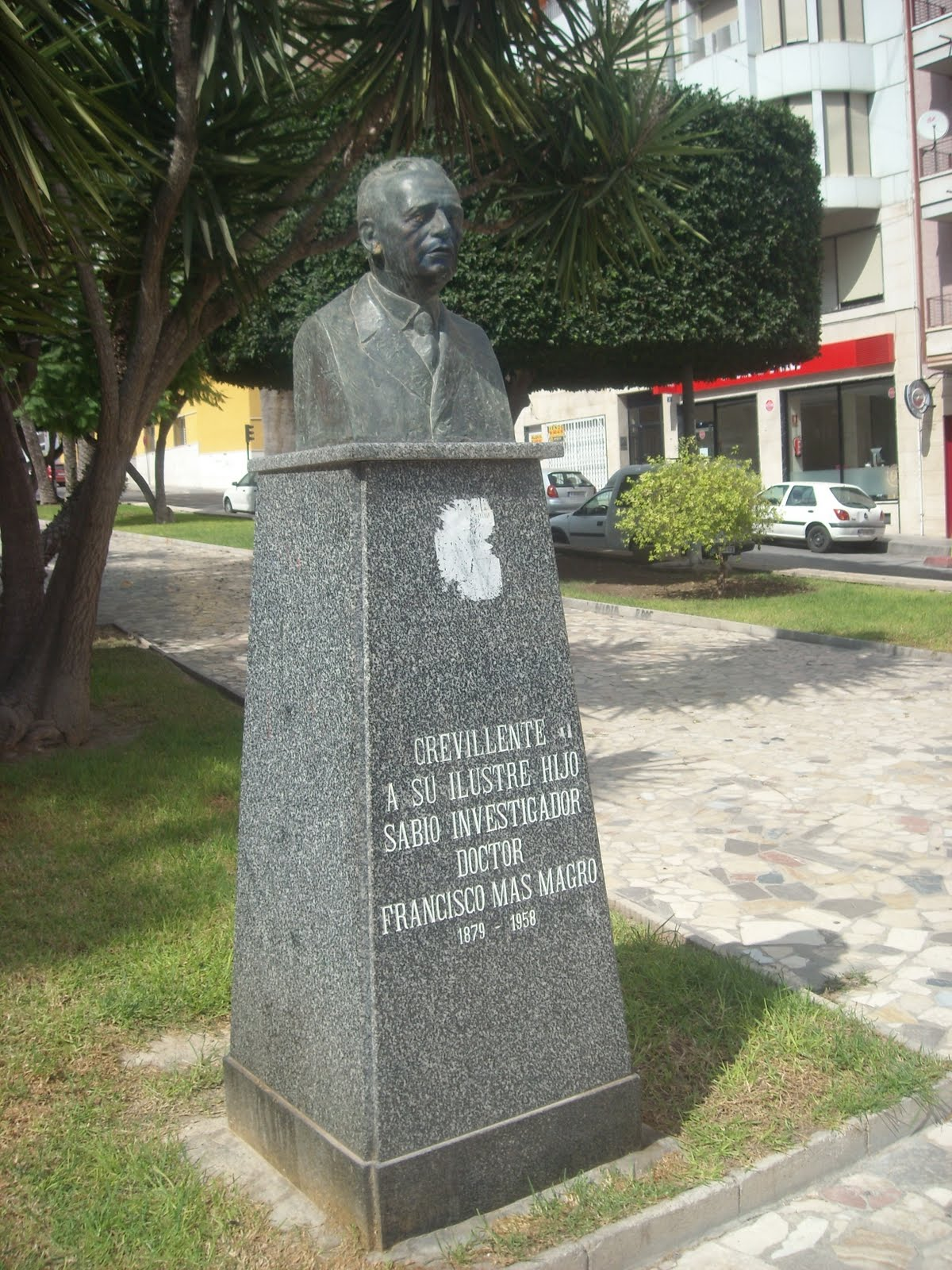 Monument a Mas Magro al Passeig del Fontenay de Crevillent